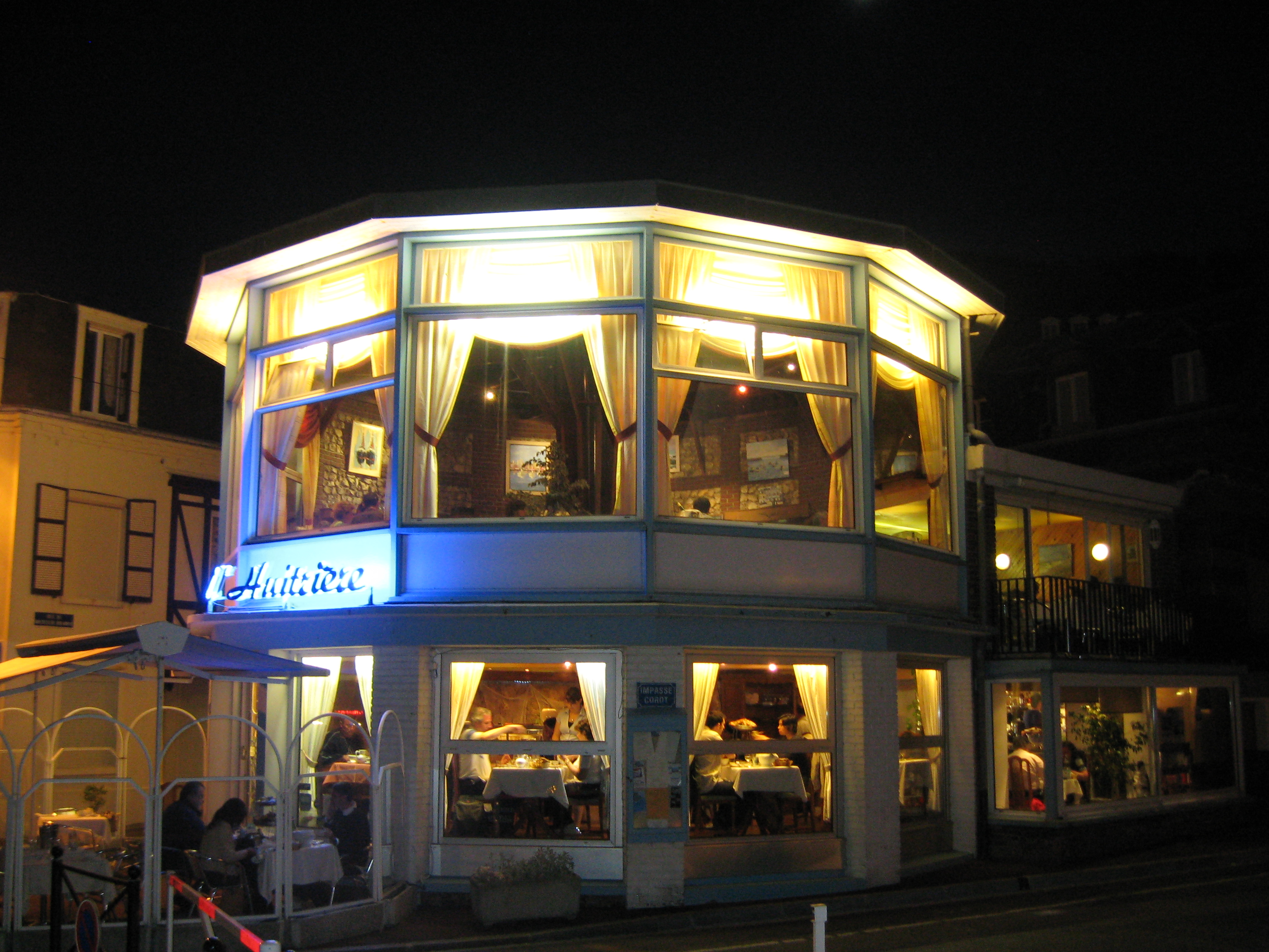 Spezialitätenrestaurant für Meeresfrüchte und Fisch in Etretat Datum: 23.05.2010 Urheber: Michael Pfeiffer Quelle: privates Fotoarchiv des Urhebers